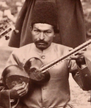 تصویر برداشت شده از کتاب موسیقی ایران در سده گذشته ، انتشارات فرهنگستان هنر سال 1390